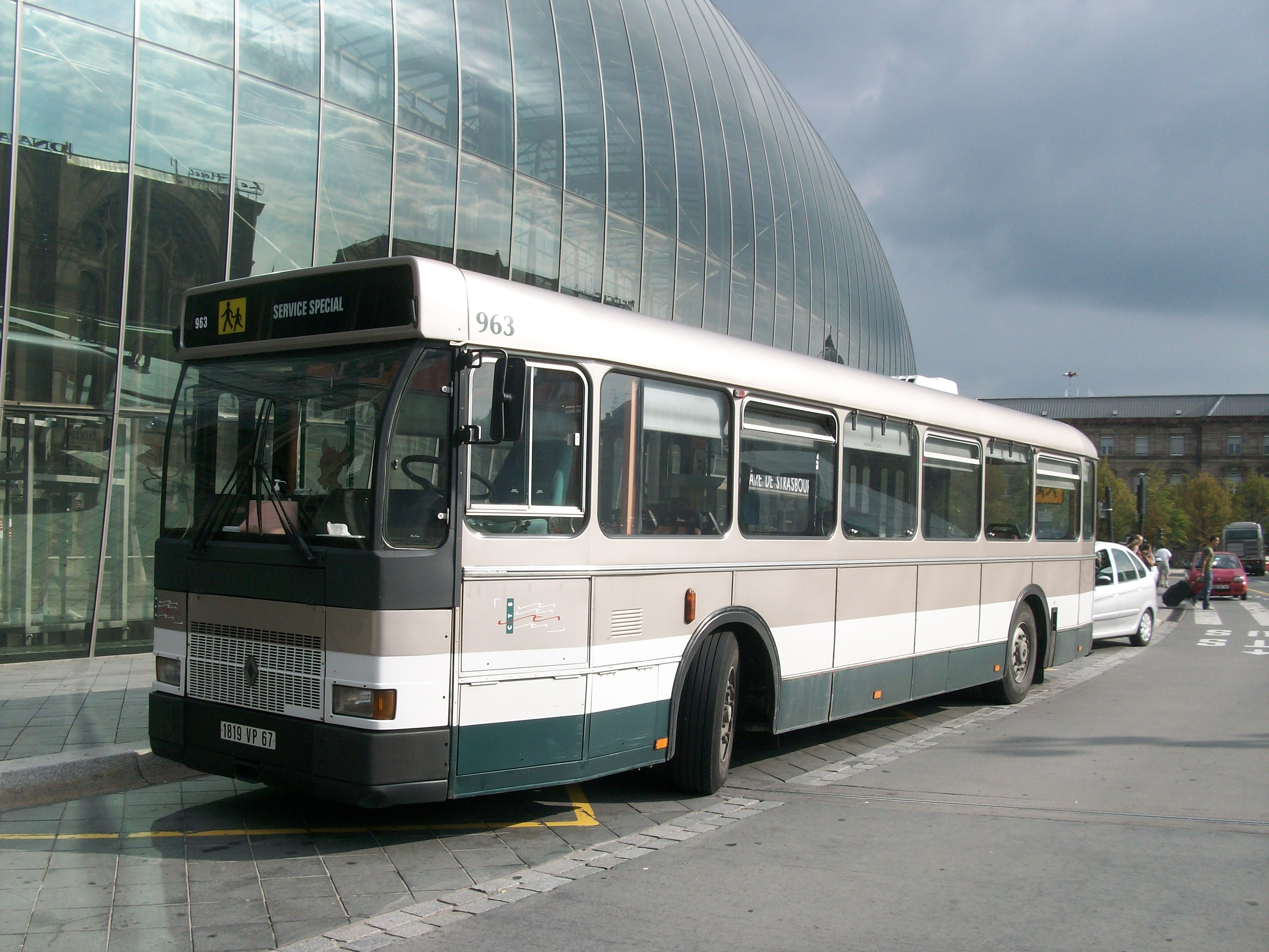 Un SC 10 R affecté au transports des personnes à mobilité réduite à Strasbourg